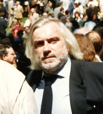 Francis Girod à l'élysée le 14 juillet 1990